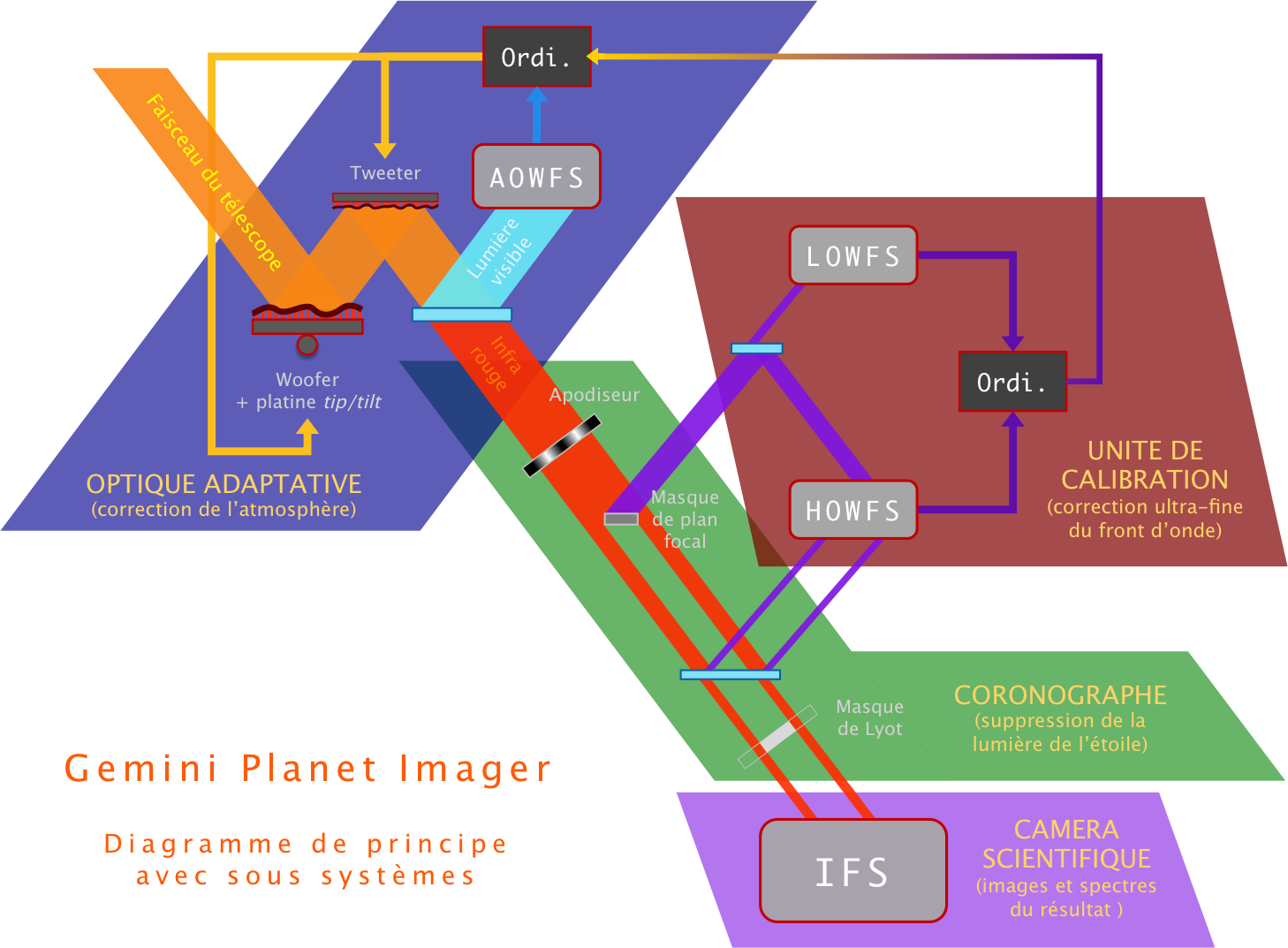 Diagramme systemes de GPI